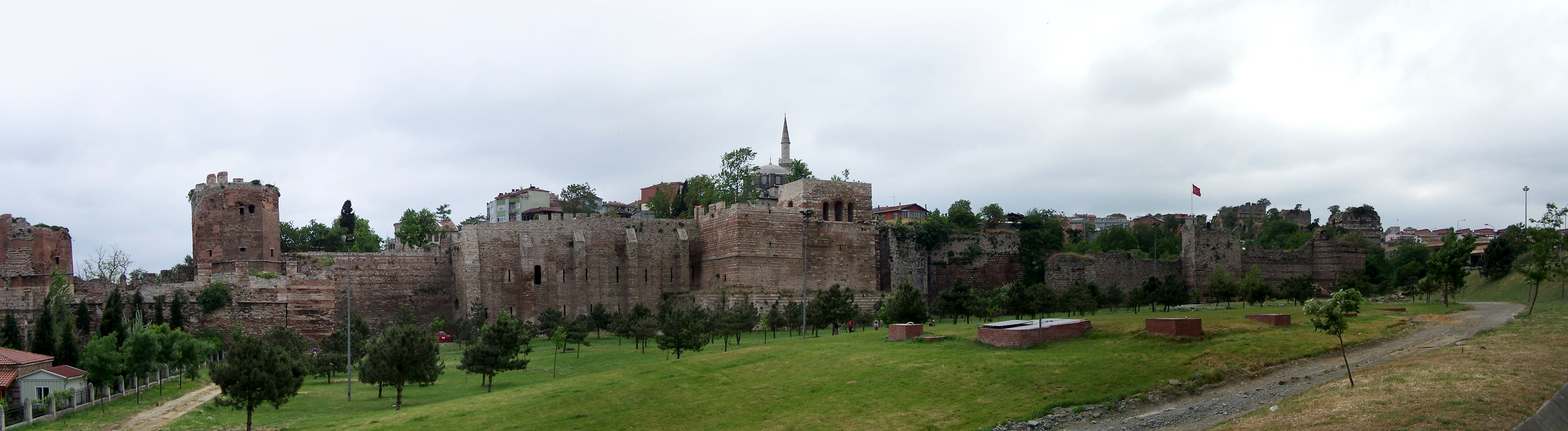 İstanbul Surları (Walls of Constantinople) in Edirnekapı, Fatih